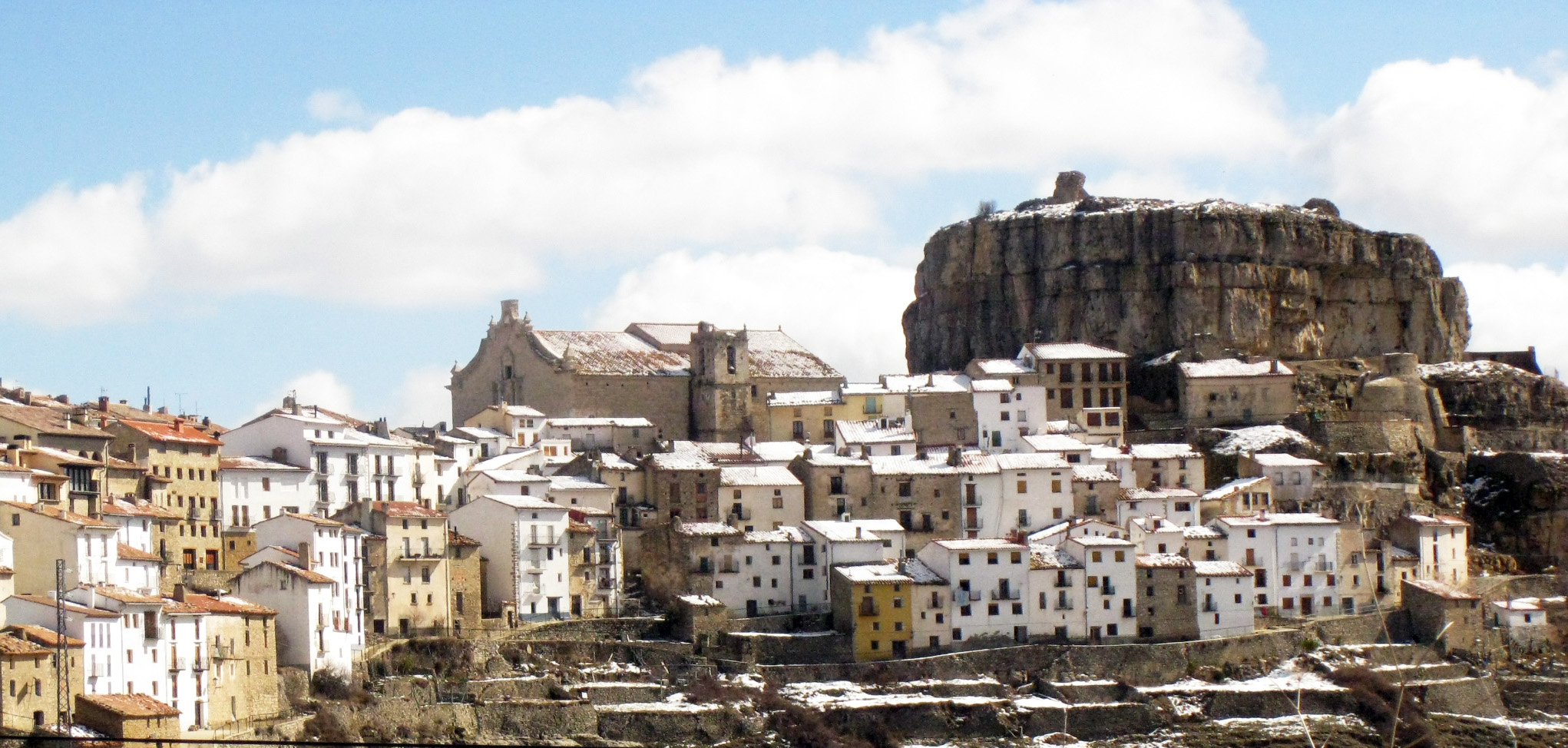 Ares (Alt Maestrat), amb la mola del Castell